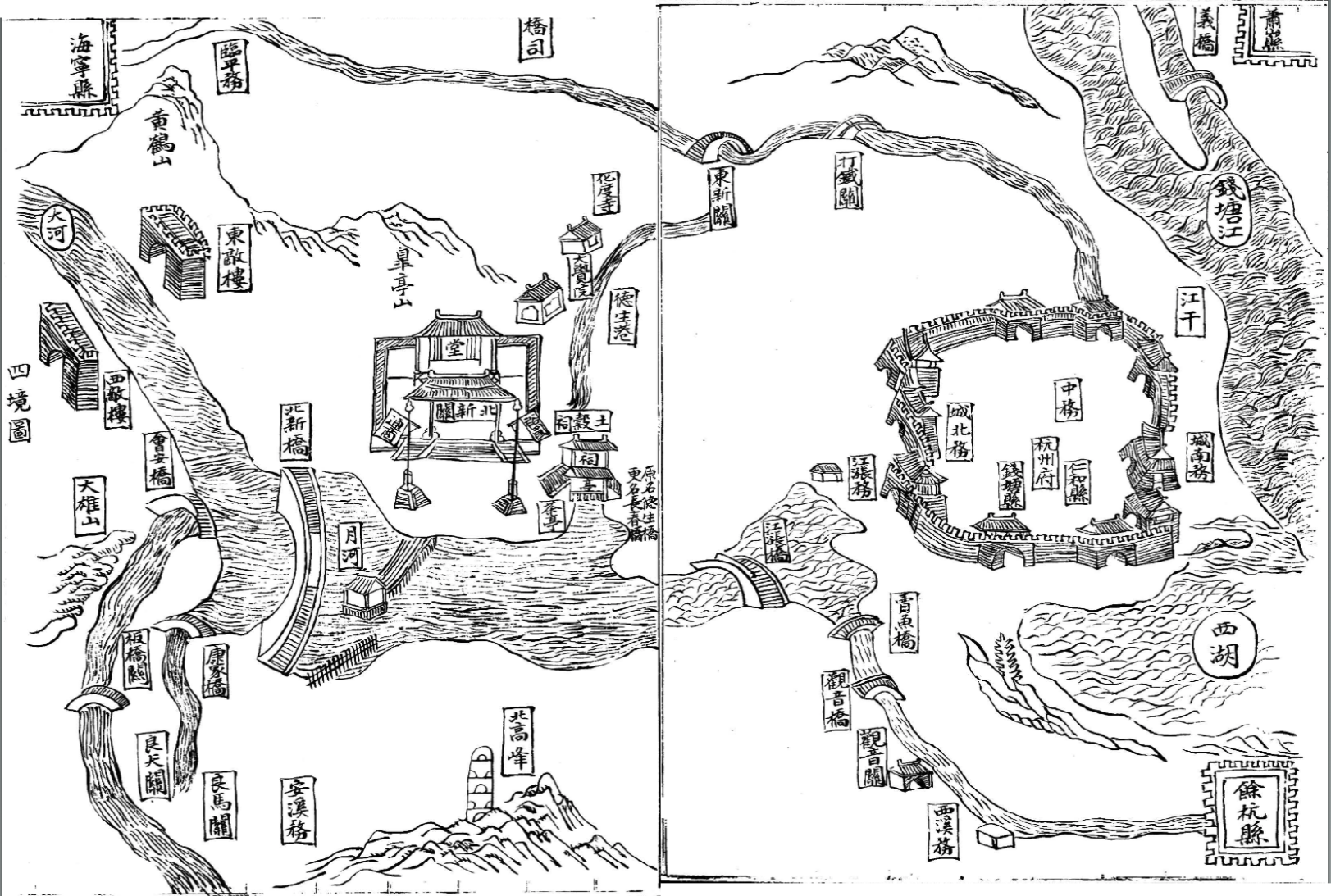 雍正《北新关志》北新关地理地图